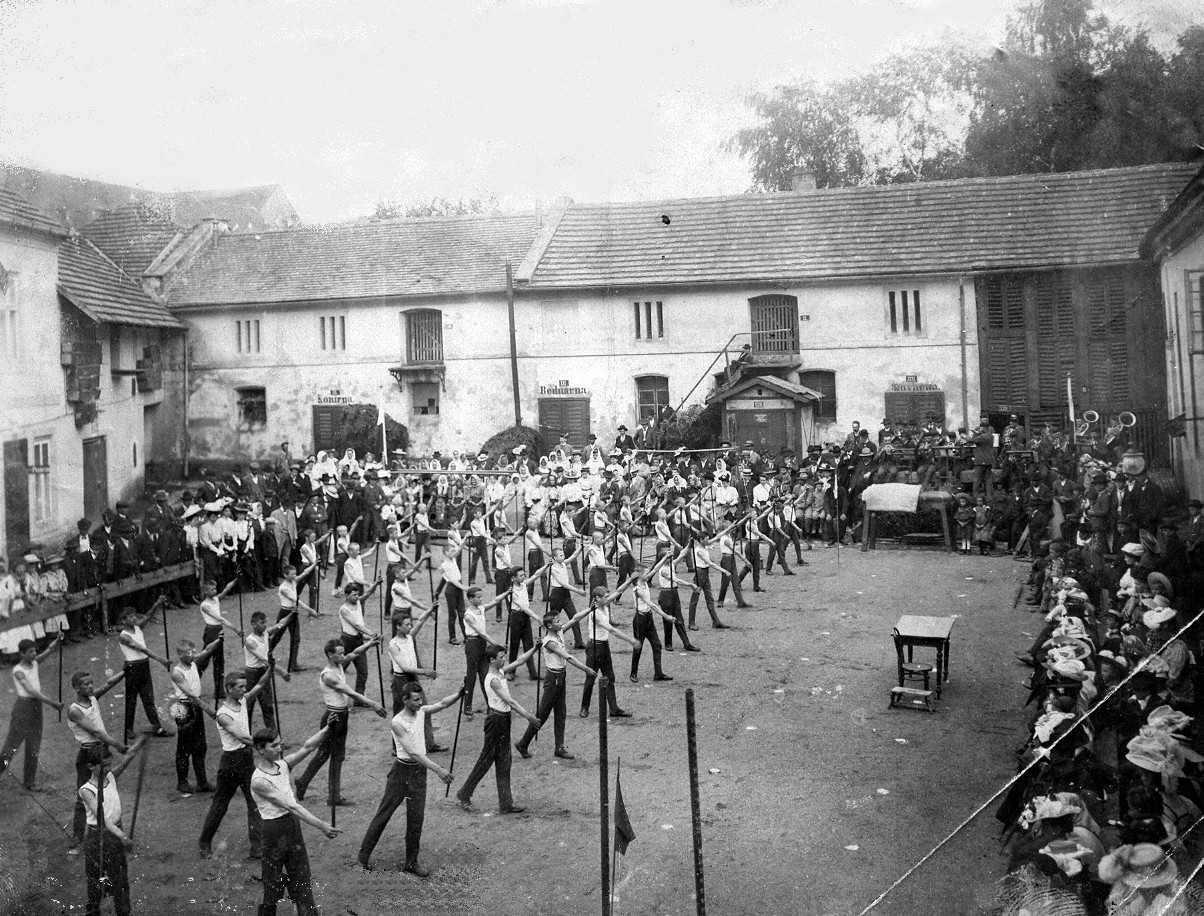 Cvičení Sokola Škvorec na dvoře pivovaru 1908. Fotografie z našeho rodiného alba.